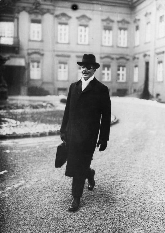 Zum Konflikt zwischen Reichsregierung und Reichsgerichtshof ! Der Reichsgerichtspräsident Dr. Simons verlässt das Palais des Reichspräsidenten, wo Dr. Simons zur persönlichen Rücksprache vom Reichspräsidenten geladen war.